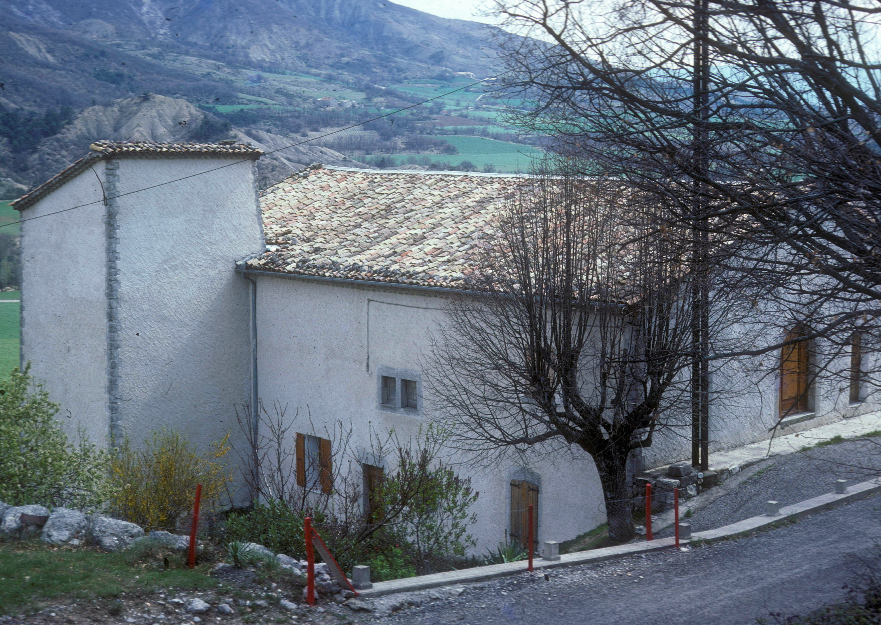 Vue de la façade Nord du Château de Le Bersac